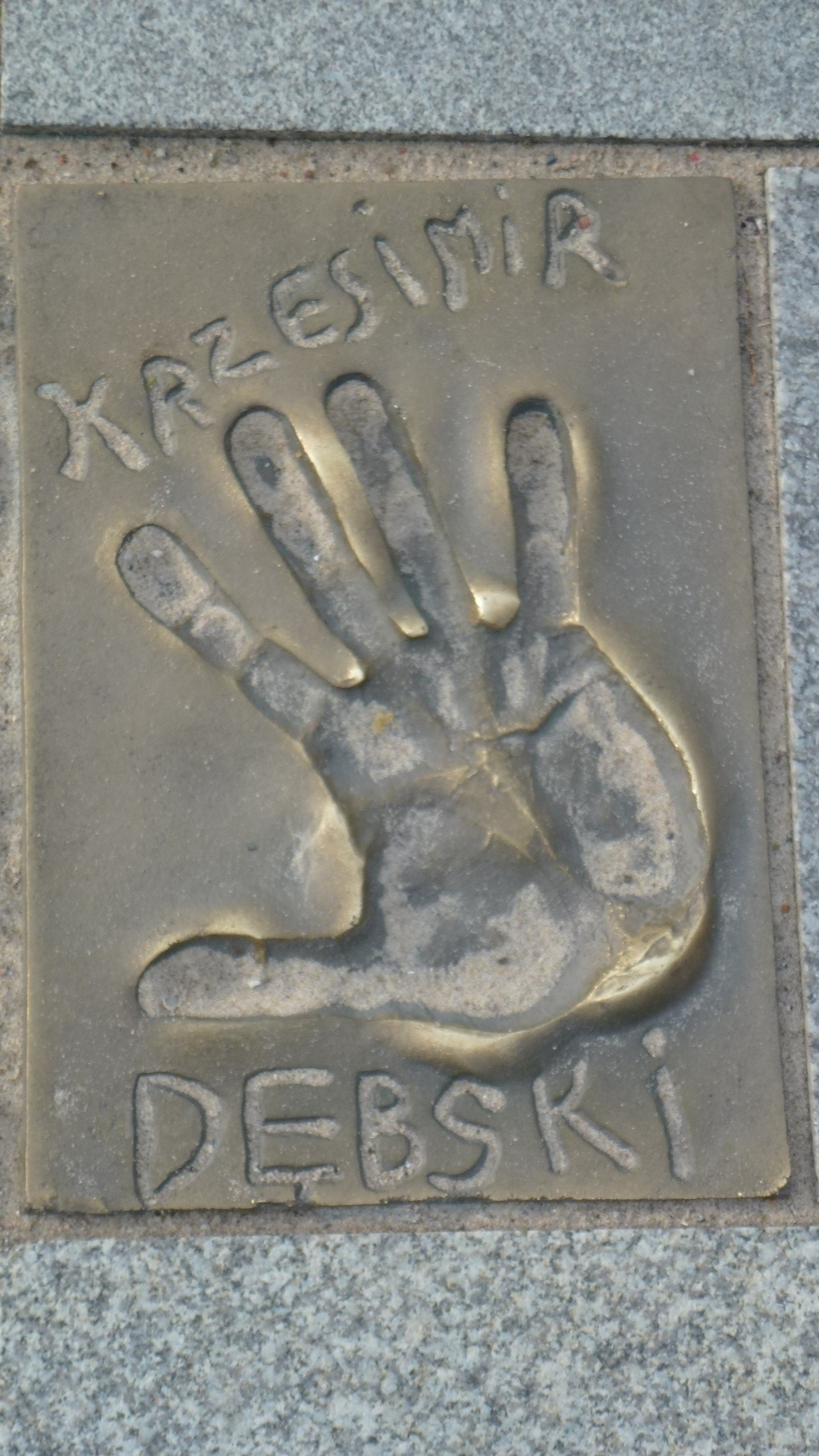 Odcisk gwiazdy na ul. Aleji Gwiazd w Międzyzdrojach woj. zachodniopomorskie pow. kamieński